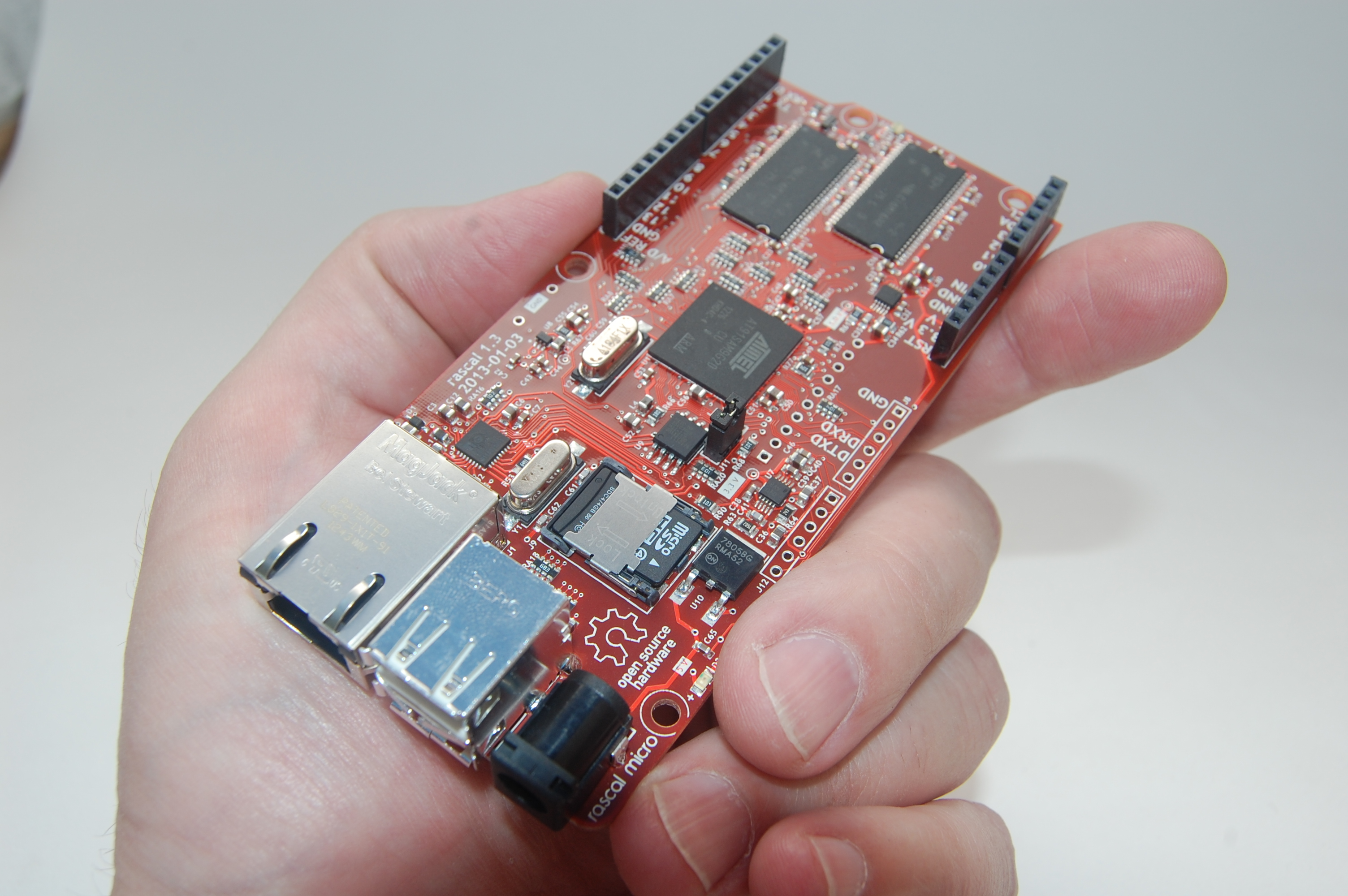 Rascal 1.3